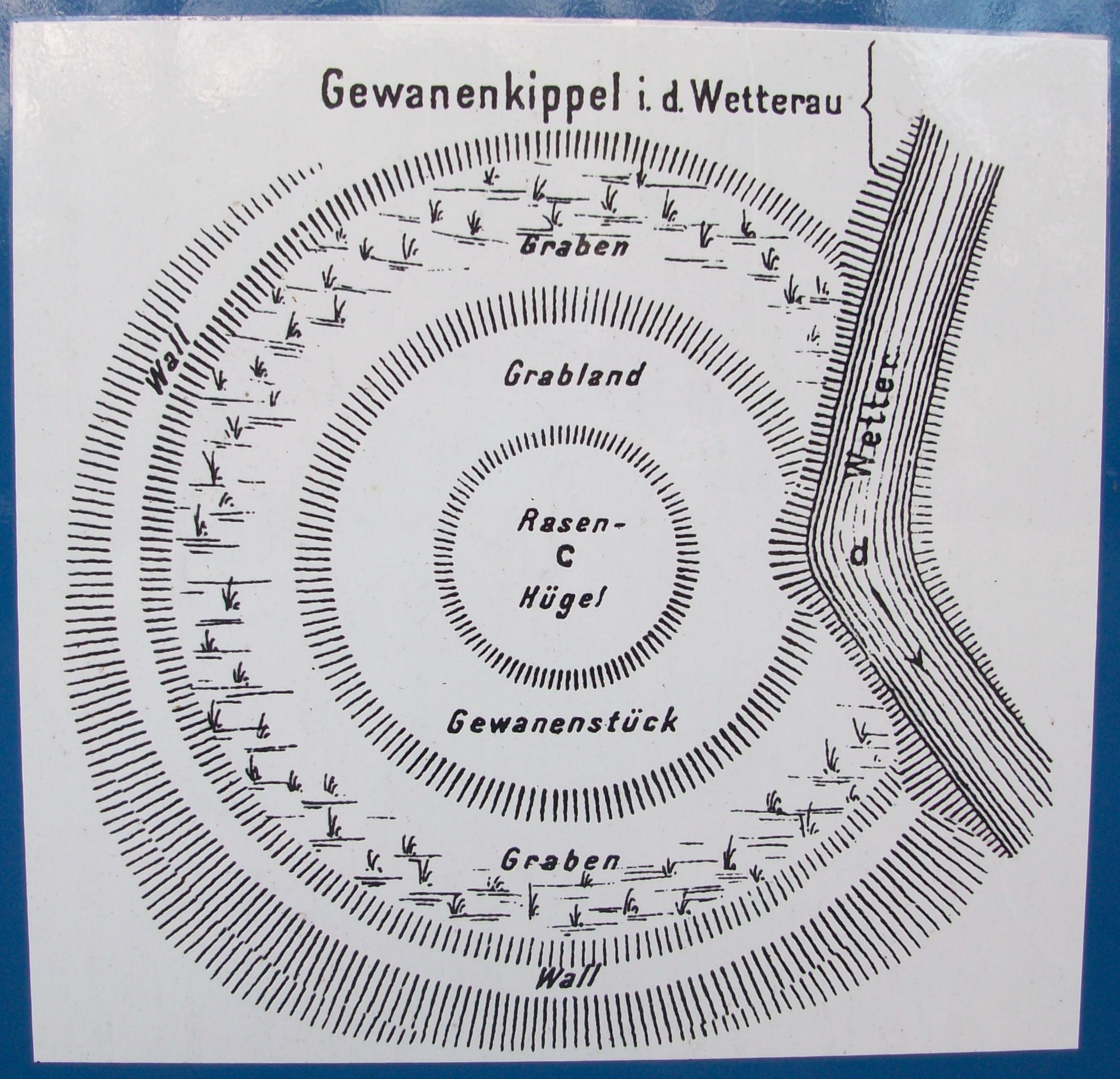 Zeichnung von Karl August von Cohausen auf der Schautafel